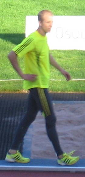 Mikko Kivinen Paavo Nurmen kisoissa, Paavo Nurmen stadionilla, Turussa, 24. kesäkuuta 2009